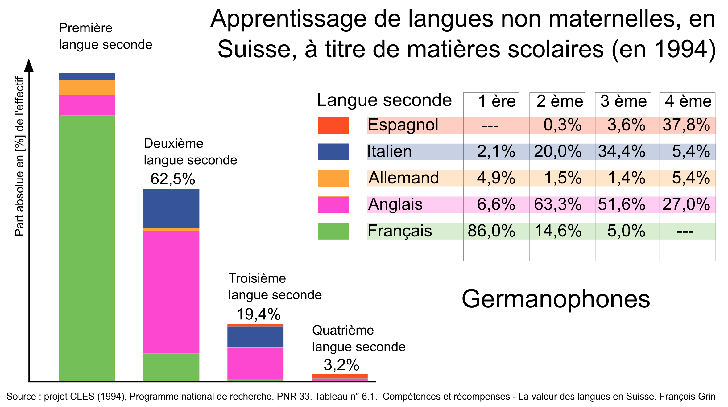 Apprentissage de langues non maternelles, en Suisse, à titre de matières scolaires (en 1994). Pour les germanophones. Graphique réalisé sur la base du tableau n° 6.1, p. 107 du livre Compétences et récompenses - La valeur des langues en Suisse de François Grin, Éditions universitaires Fribourg, Suisse, 1999 (ISBN 2-8271-0843-7)